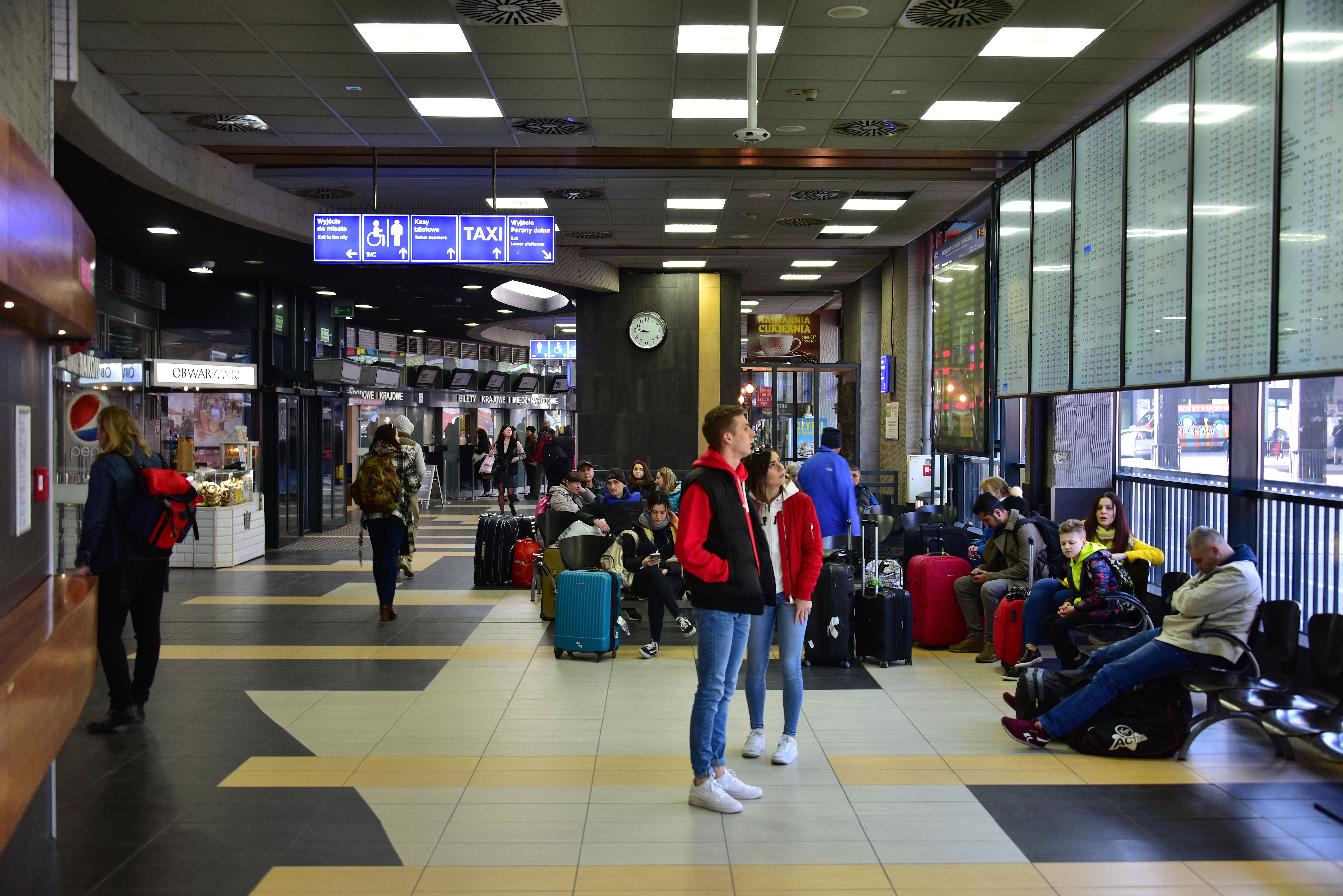 Wnętrze dworca autobusowego MDA w Krakowie